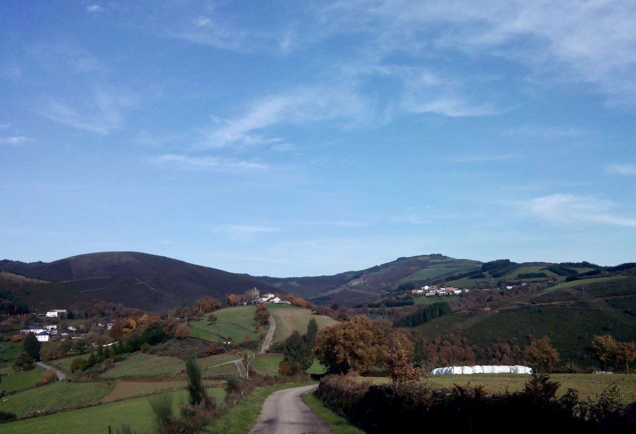 Lugar de Quintá de Cancelada. Concello de Becereá